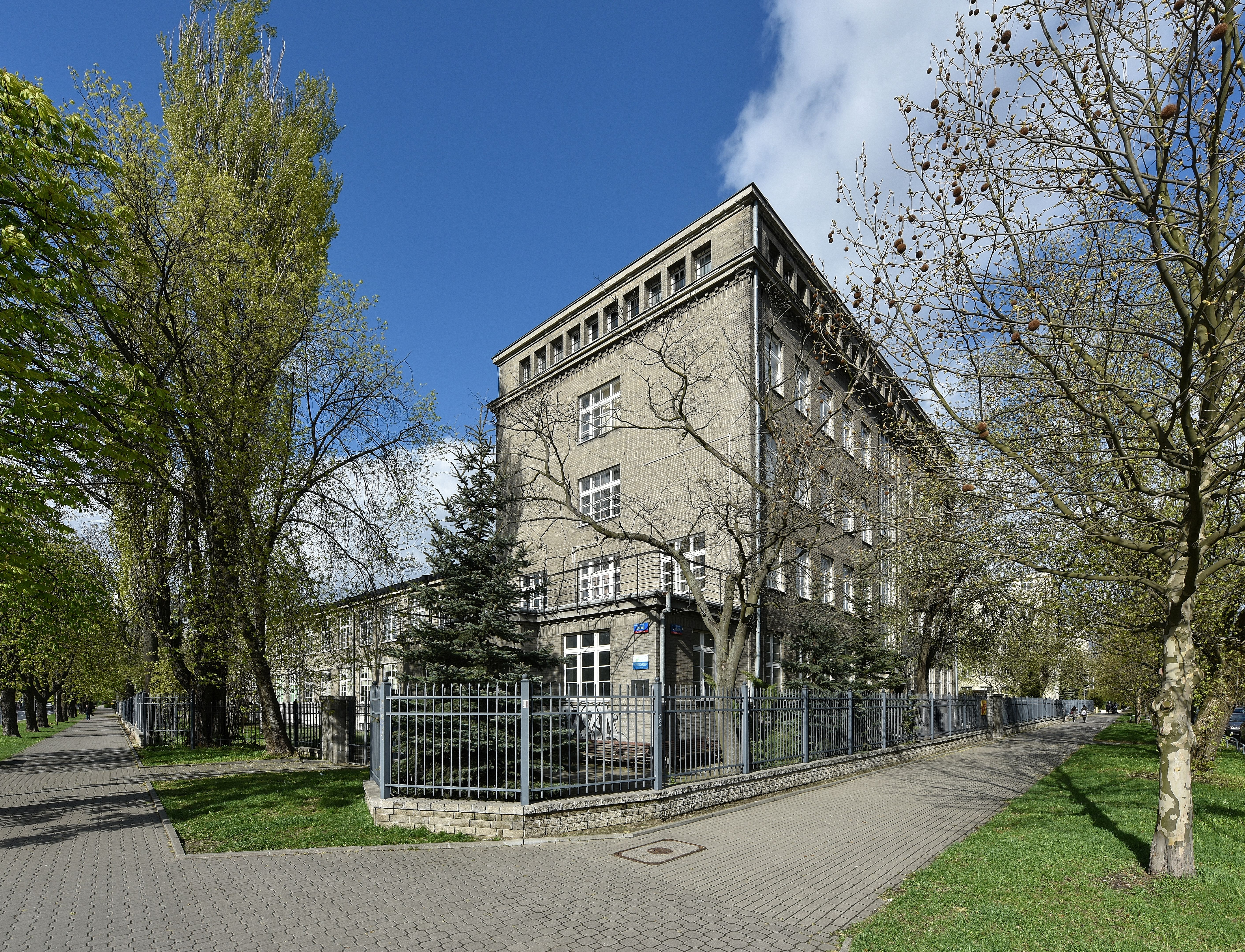 Budynek Wyższej SzkołY Budowy Maszyn i Elektrotechniki im. H. Wawelberga i S. Rotwanda przy ul. Narbutta 86 w Warszawie. Obecnie Wydział Inżynierii Produkcji Politechniki Warszawskiej